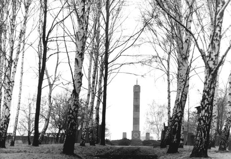 ADN-ZB-Zimmermann-28.3.85-hü-Berlin: Ehrenfriedhof - Im sowjetischen Ehrenfriedhof in Marzahn, Wiesenburger Weg, wird das Andenken anjene Soldaten bewahrt, die am Abend des 21. April 1945 den Ort befreiten. An die Heldentaten der Roten Armee erinnert ein Obelisk aus rotem Porphyr. -siehe auch die Fotos 1985-0328-24 u. 25 N